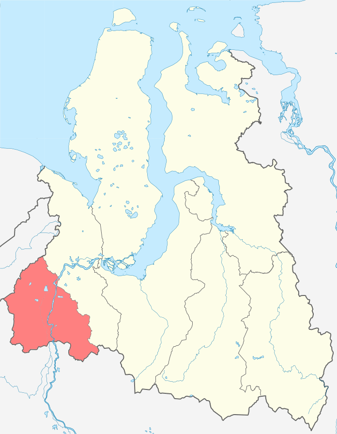 Район на карте Ямало-Ненецкого автономного округа